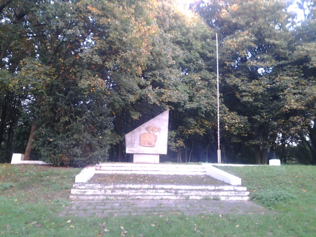 Pomnik Ofiar Faszyzmu w Łagiewnikach, na terenie poligonu w Biedrusku